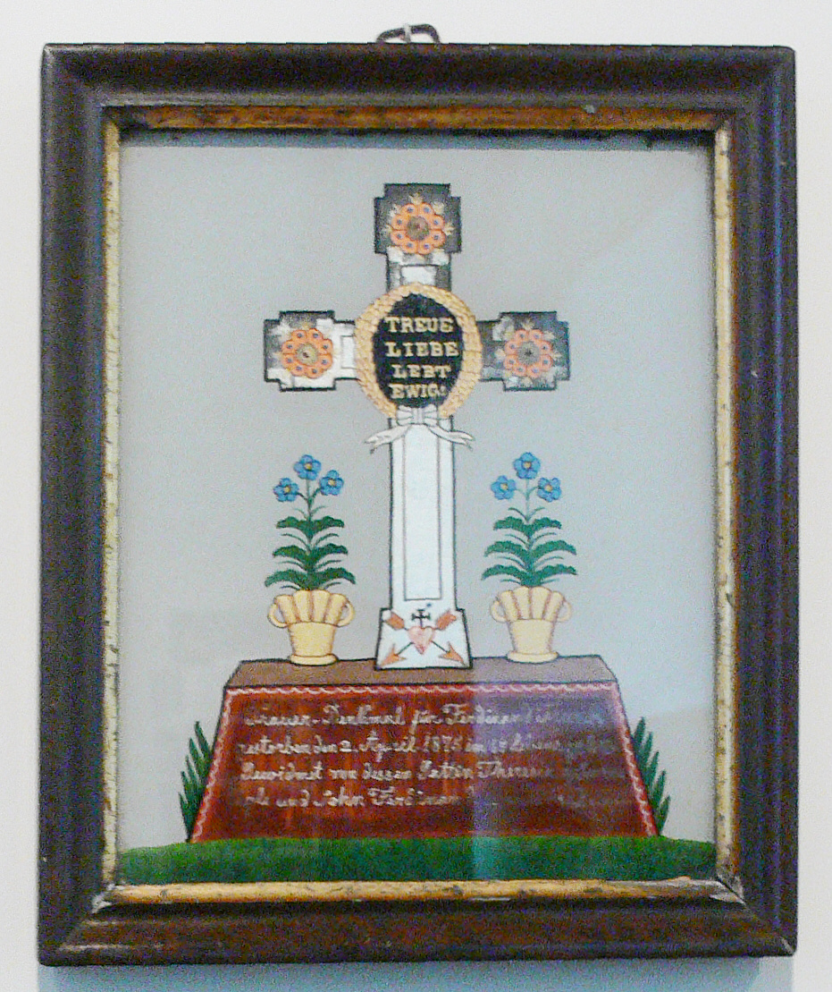 Hinterglasbild zur Totenerinnerung, in Fichtenrahmen, datiert 1875 Landesmuseum Württemberg (Außenstelle Museum für Volkskultur in Württemberg, Waldenbuch) 1.1.1, Inv. Nr. VK 1986/128